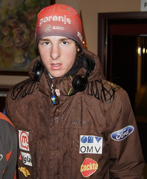 Hvala Jaka